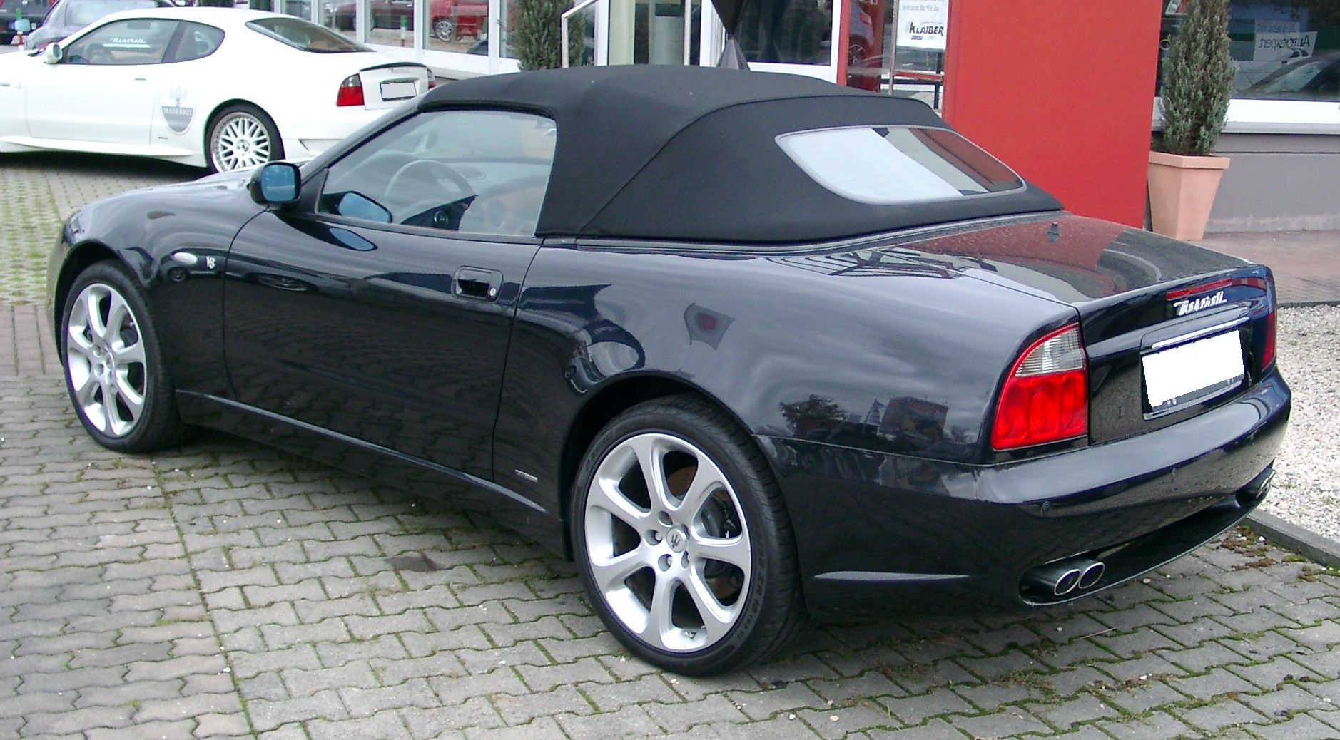 Maserati Spyder Cabriolet